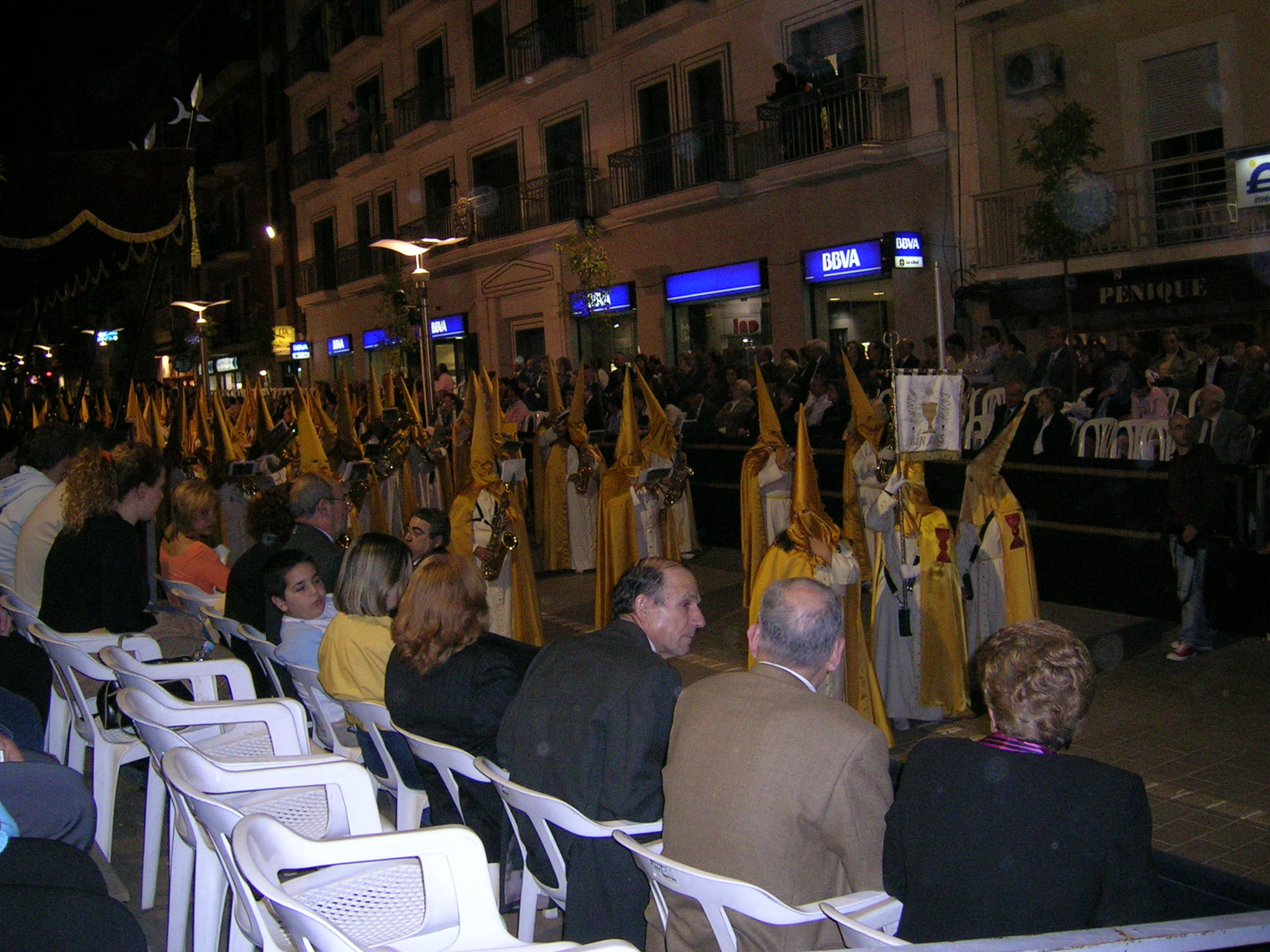 Banda de cabecera de la Santa Cena Banda de cabecera de la Santa Cena pasando por carrera oficial